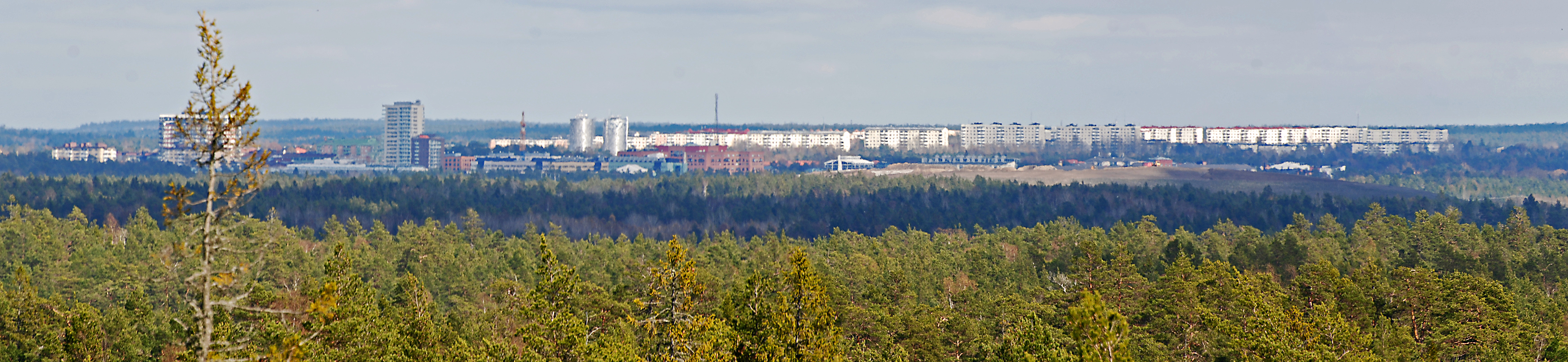 Tornberget, utsikt mot Handen och Brandbergen